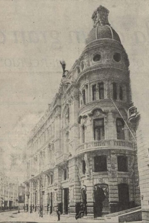 Fachada del Edificio de El Mercurio de Valparaíso construido en 1869 y hasta 1925 cuando fue demolido